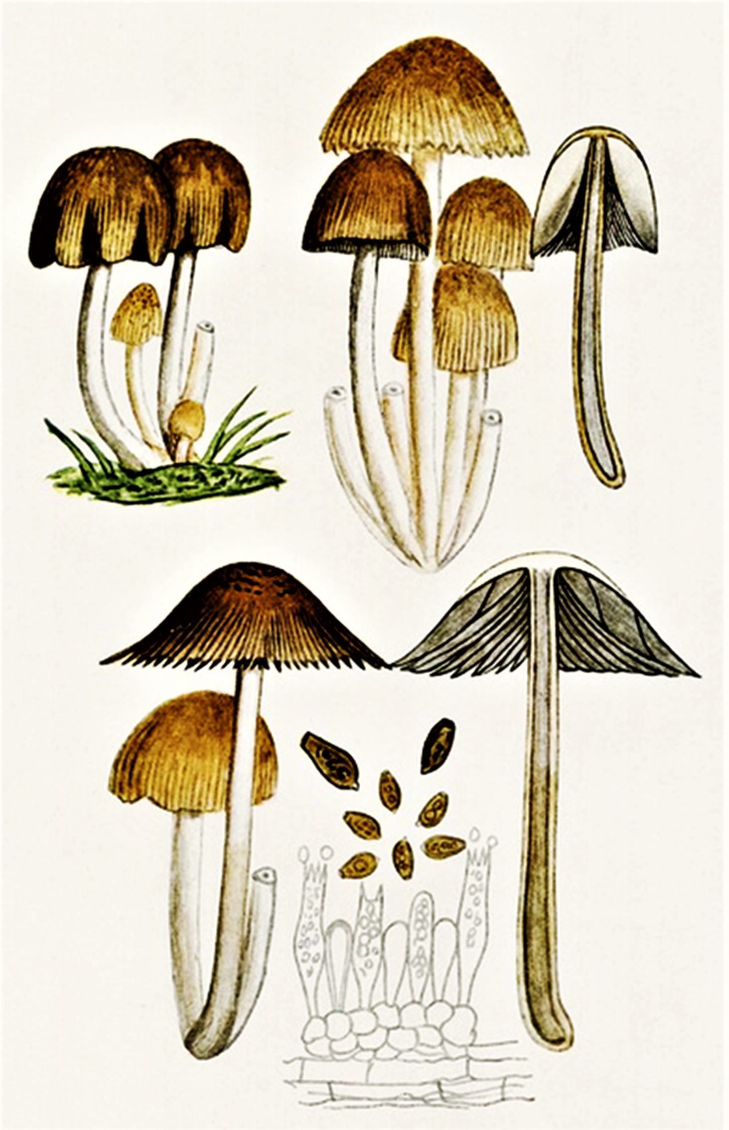 Giacomo Bresadola: Coprinus micaceus (Bull., 1792) Fr. (1838), heute Coprinellus micaceus (Bull.) Vilgalys, Hopple & Jacqu.Johnson (2001)